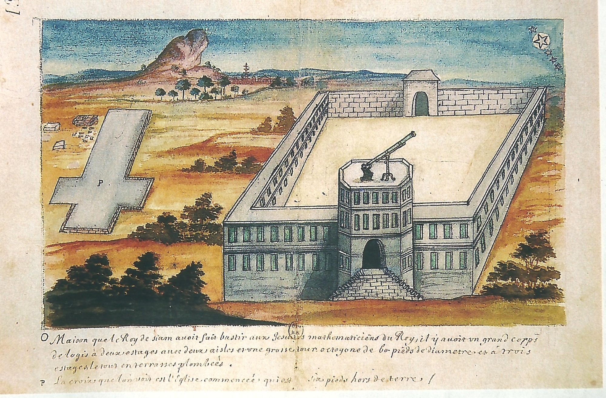 ภาพวาดสีน้ำของหอดูดาวเมืองลพบุรี เมื่อครั้งยังสมบูรณ์ มีประวัติว่าบาทหลวงปูโช (Pouchot) คณะเยสุอิตมอบให้หอสมุดแห่งชาติฝรั่งเศส เมื่อ พ.ศ. 2305 (ค.ศ. 1762) สมเด็จพระนารายณ์มหาราชทรงสร้างสถานที่แห่งนี้พระราชทานให้กับบาทหลวงเยสุอิตชาวฝรั่งเศส เพื่อการศึกษาค้นคว้าวิชาดาราศาสตร์และคณิตศาสตร์ หอดูดาวใช้งานได้จริงเมื่อราว พ.ศ. 2229 สำหรับฐานอาคารที่อยู่ใกล้ๆ มีผังเป็นรูปไม้กางเขนคือฐานของโบสถ์ที่กำลังเริ่มก่อสร้าง